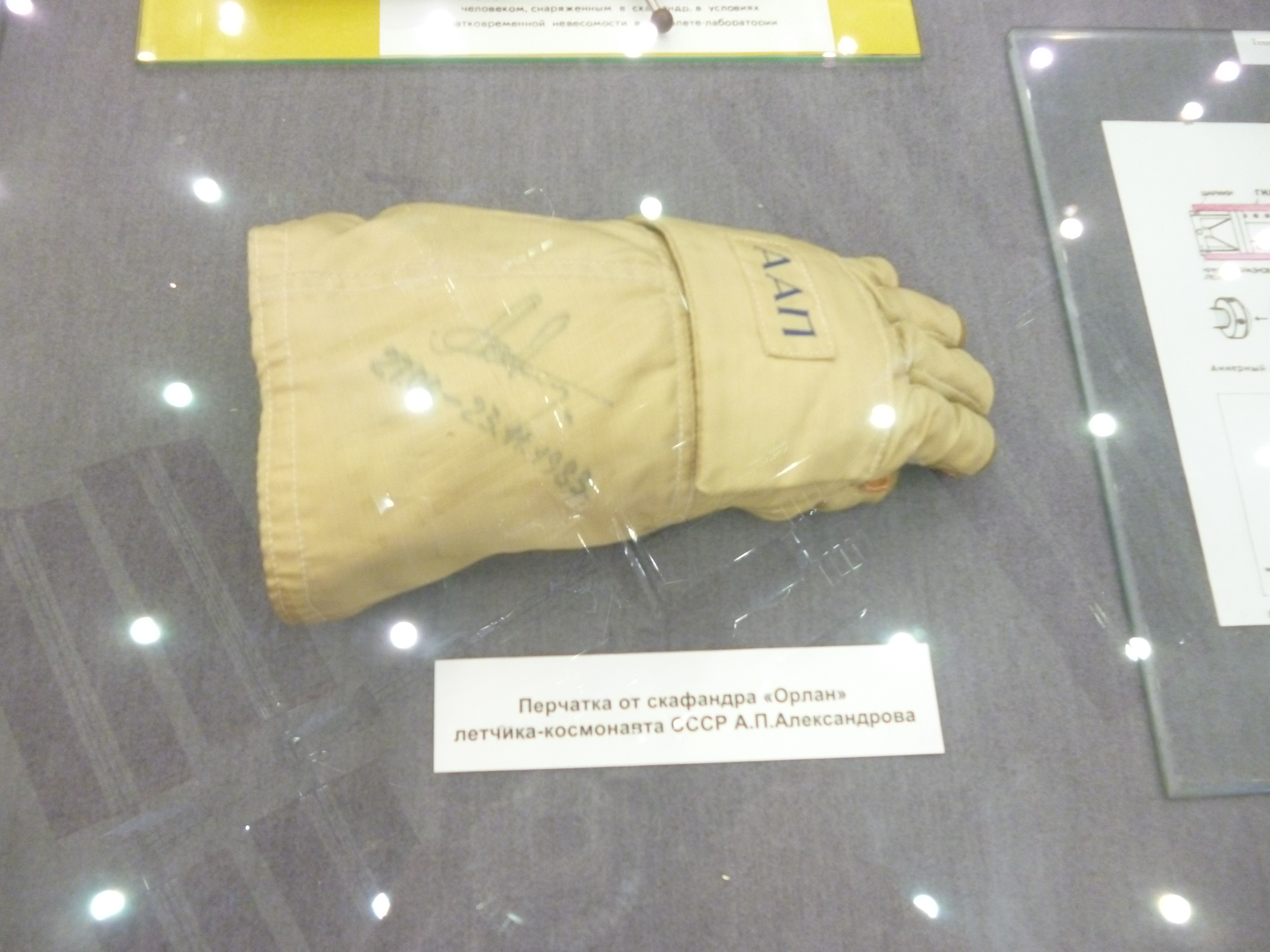 Перчатка скафандра "Орлан" лётчика-космонавта СССР А. П. Александрова. Государственный музей истории космонавтики имени К. Э. Циолковского.